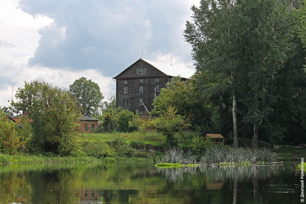 Деревянная мельница Баркова. Вид со стороны реки Оскол.